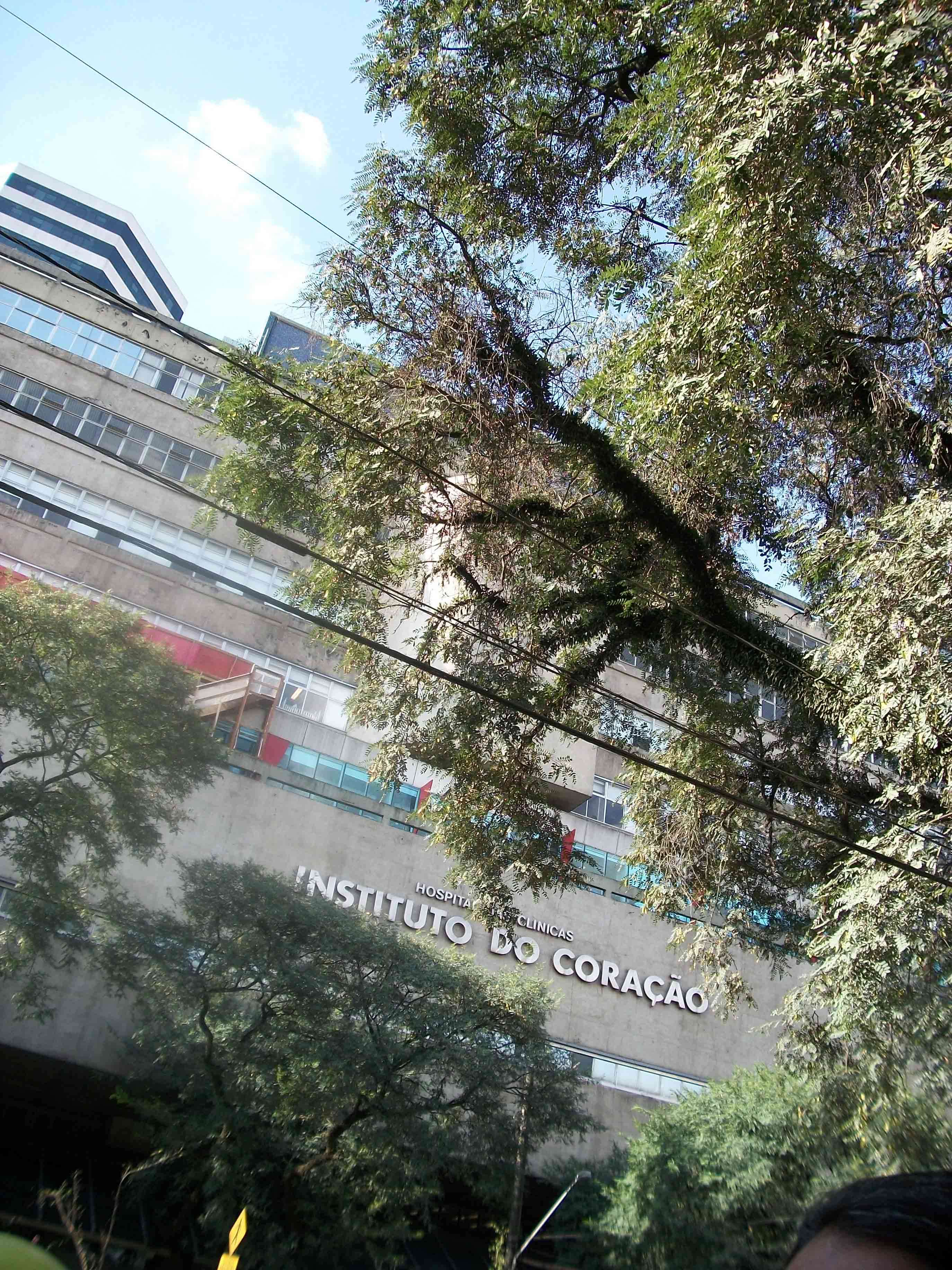 Fachada do InCor da FMUSP.